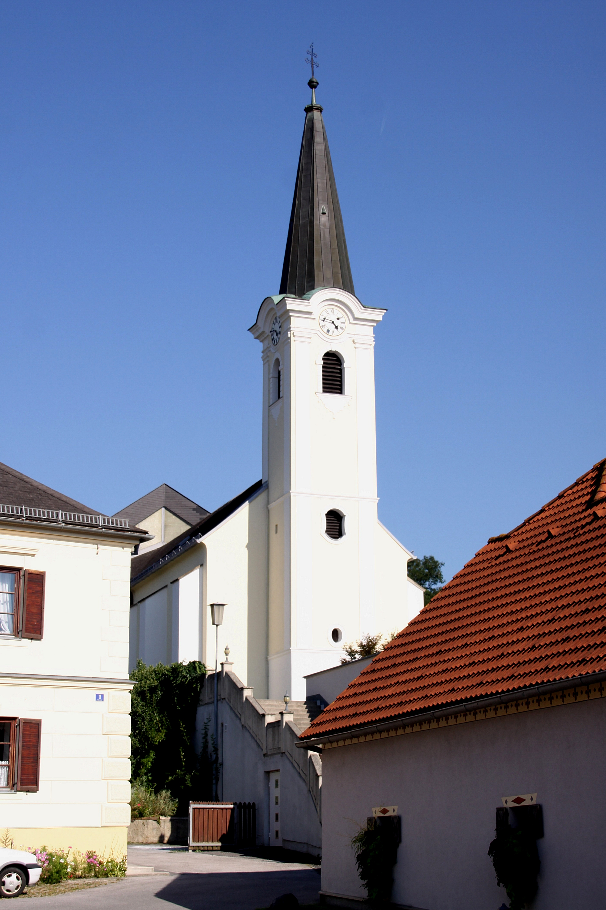 Römisch-katholische Pfarrkirche in Pilgersdorf, Bezirk Oberpullendorf, Burgeland, Österreich)